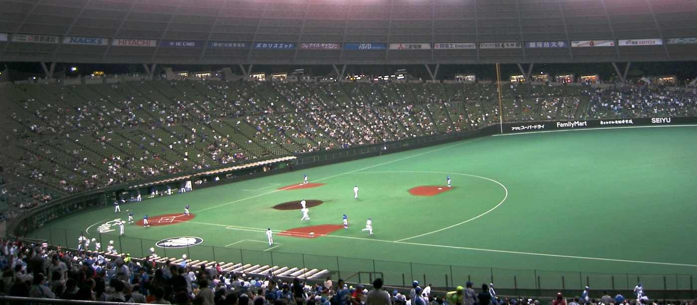 “Seibu Dome” Seibu Lions professional baseball team located in Tokorozawa, Saitama, Japan. “西武ドーム” 日本の埼玉県所沢市にあるドーム式野球場。日本のプロ野球パリーグに加盟する、西武ライオンズのホーム球場でもある。フィールド全景を全体が写るように外野席から撮影。